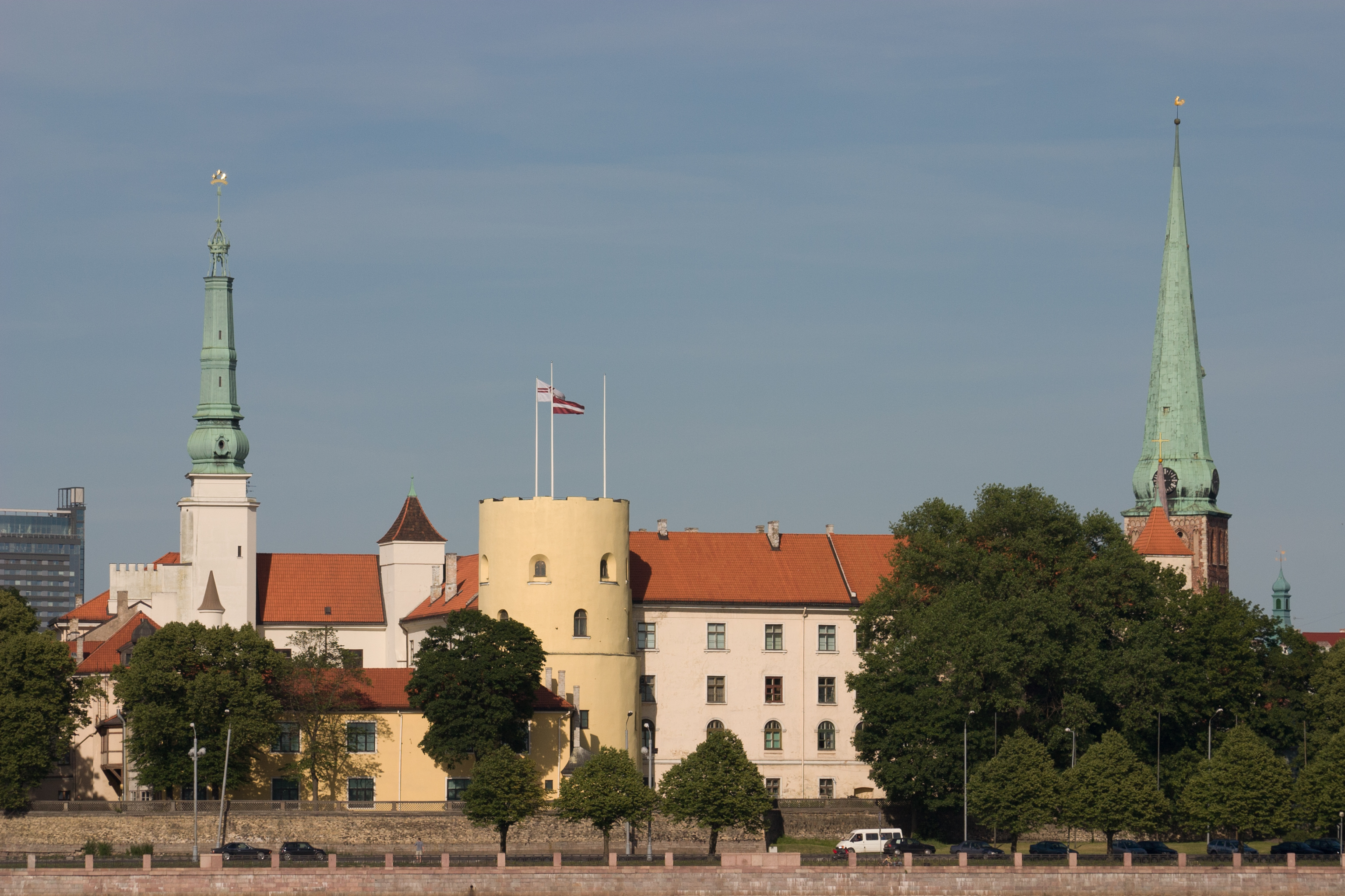 Rīgas pils, Centra rajons, Pils laukums 3